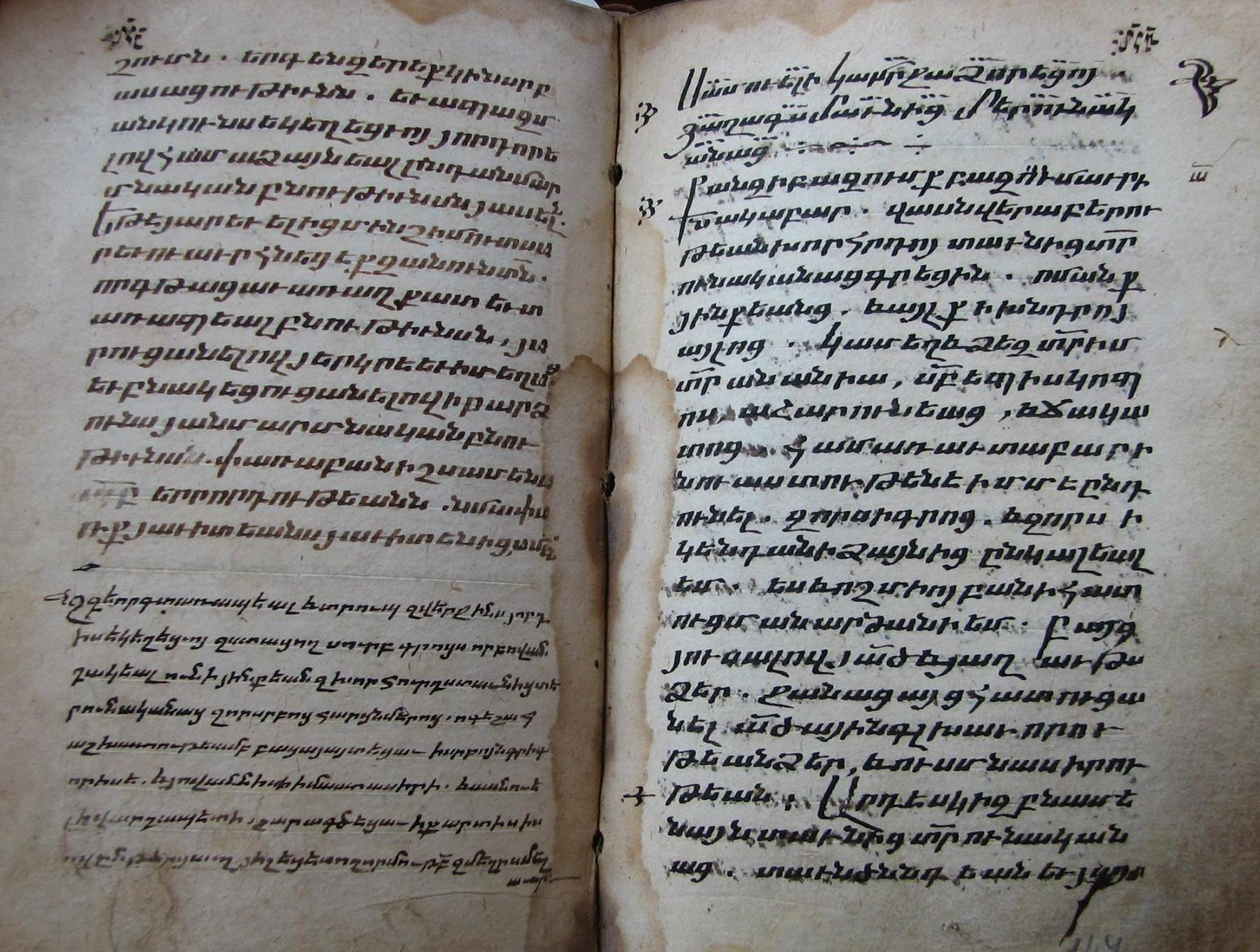 Սամուէլ Կամրջաձորեցի, Յաղագս տաւնից տերունականաց